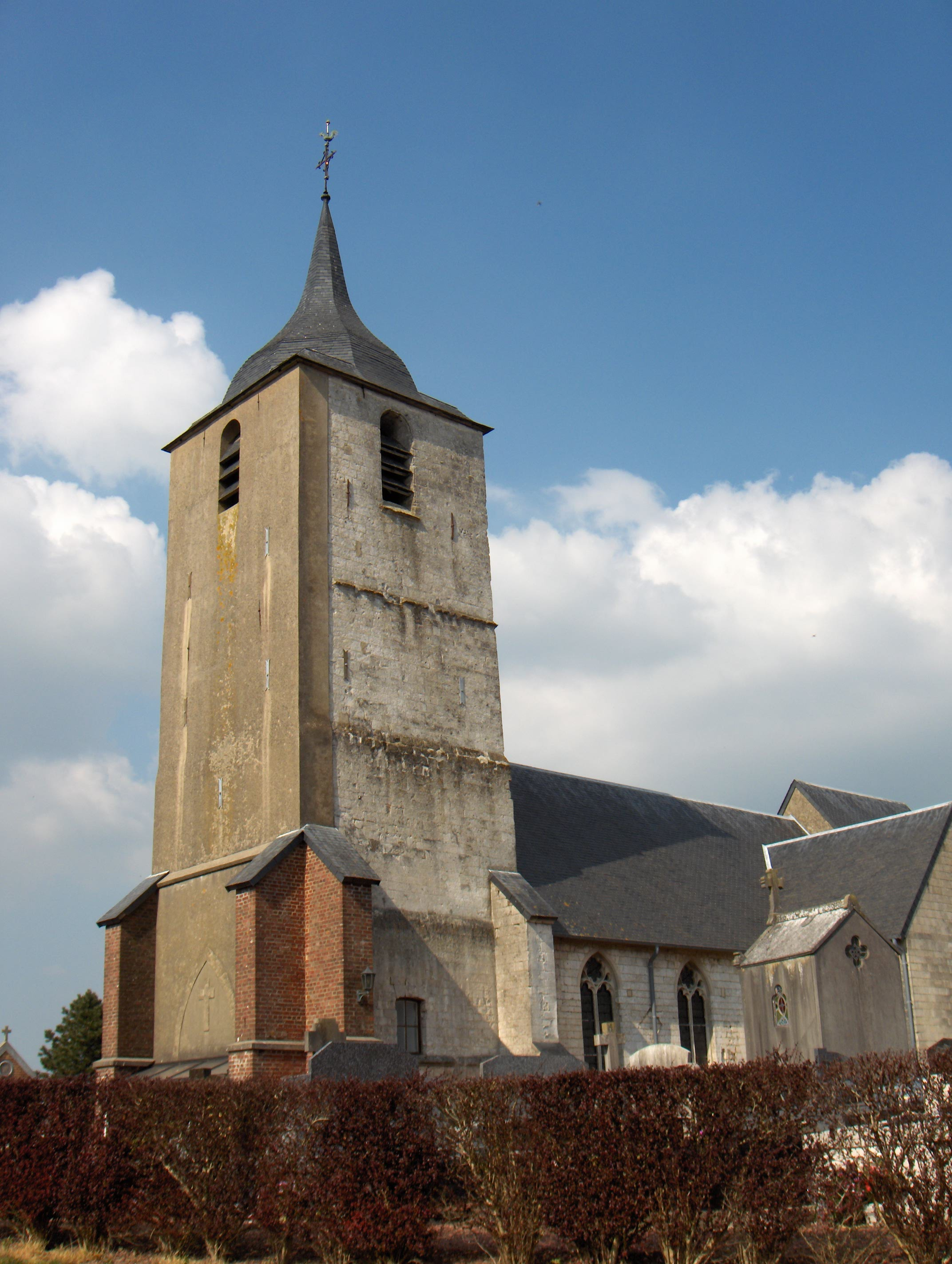 Audomaruskirche (église Saint-Omer) zu Campagne-lès-Boulonnais (Frankreich, Dept. Pas-de-Calais), Turm des 15. Jh.s.